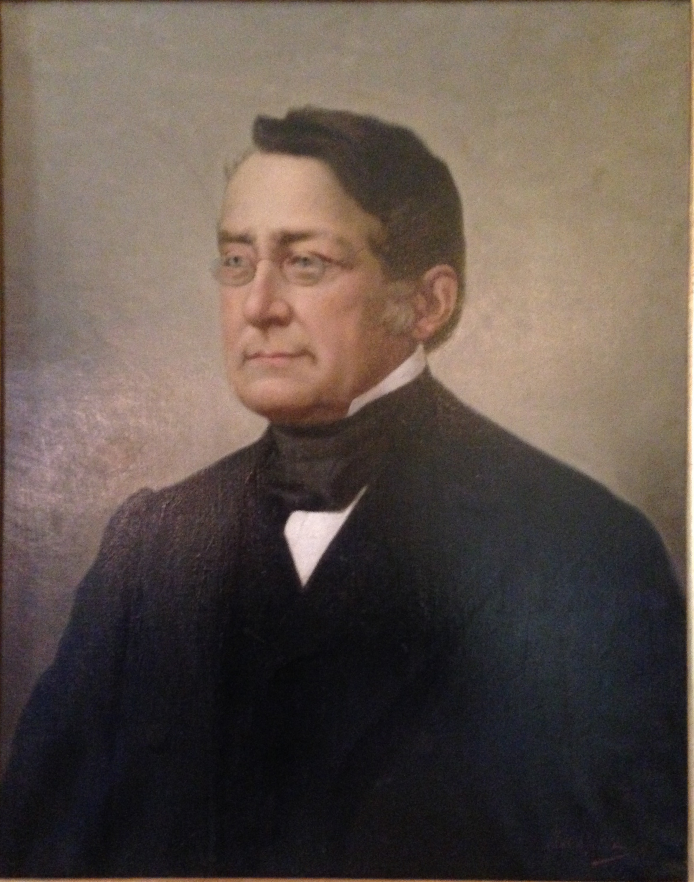 B Frerejean (1802-1871)